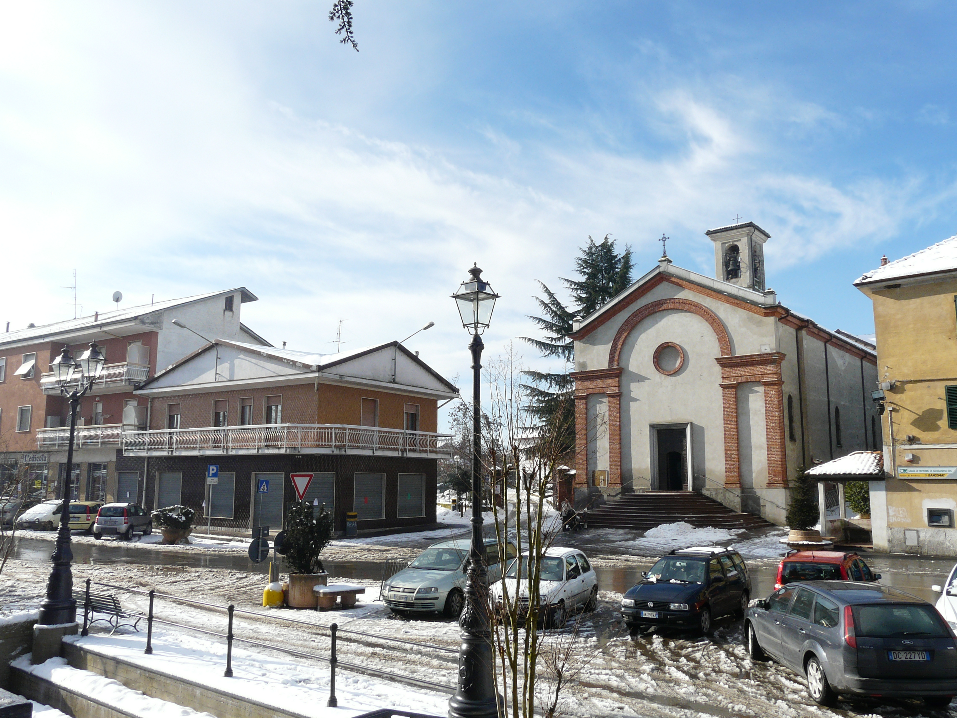 Scorcio di Predosa, Piemonte, Italy